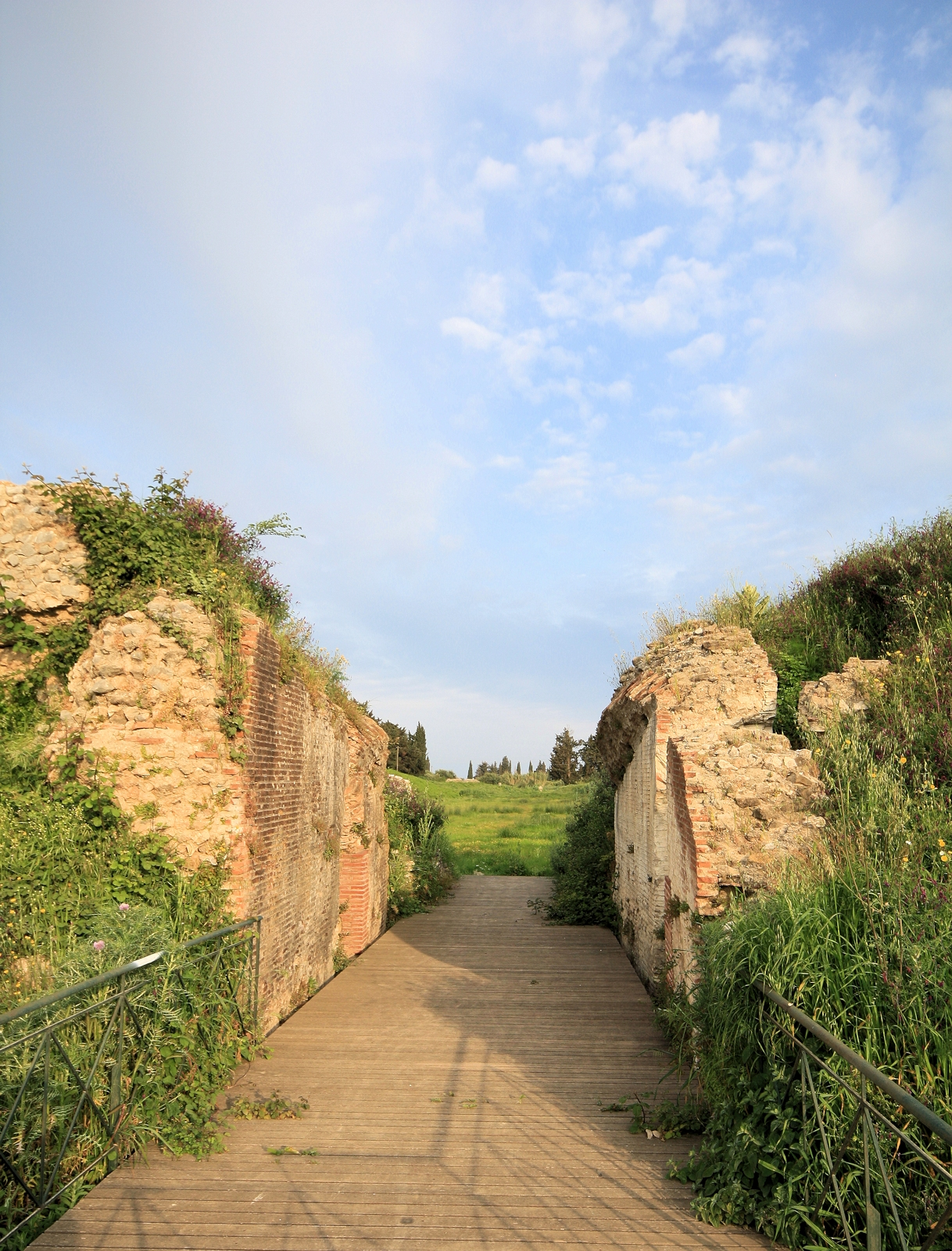 Αρχαία Νικόπολη. Η είσοδος του σταδίου.